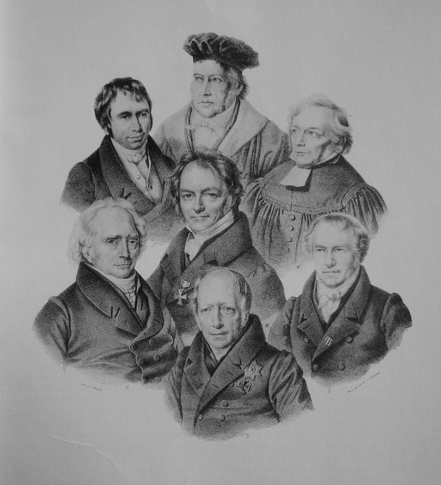 Das gelehrte Berlin; Lithographie nach einer Zeichnung von Julius Schoppe. Das Tableau zeigt von oben nach unten und von links nach rechts: Georg Wilhelm Friedrich Hegel (Mitte), Johann August Wilhelm Neander, Friedrich Ernst Daniel Schleiermacher, Karl Ritter (Mitte), Christoph Wilhelm Hufeland, Alexander von Humboldt, Wilhelm von Humboldt (Mitte).